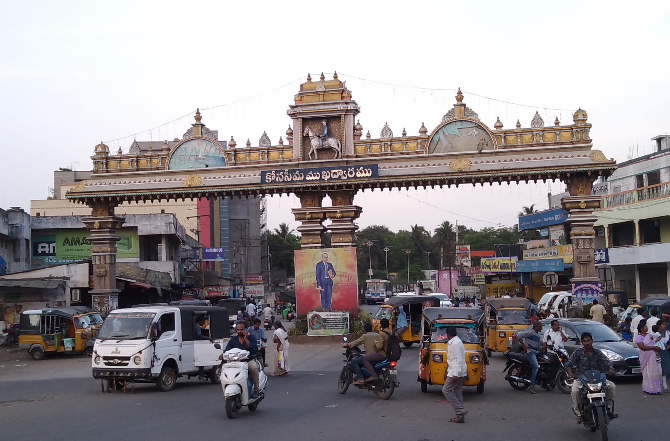 కోనసీమ ముఖద్వారం